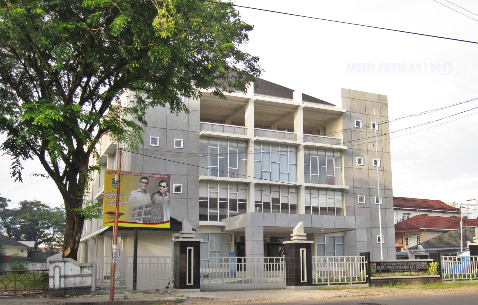 Perpustakaan Sumatra Barat